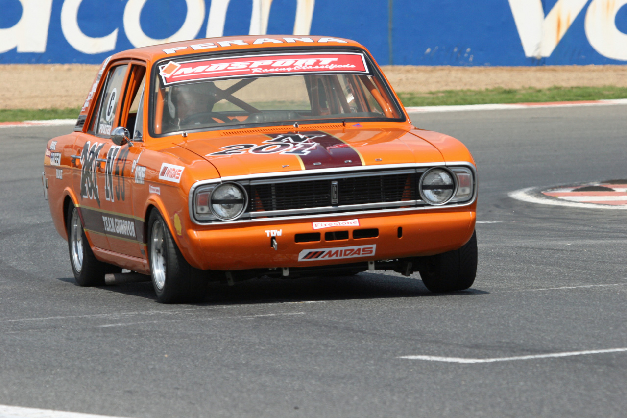 Gunston Cortina auf dem Kyalami Circuit 2008